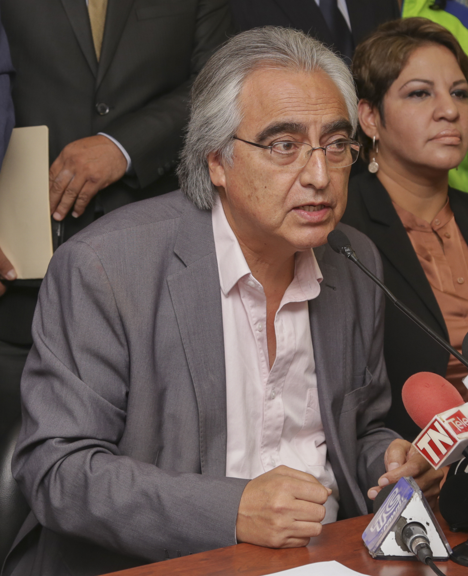 Rueda de Prensa de la Asambleísta Elzabeth Cabezas. Tema: Resultados Oficiales Electorales oficiales de la Consulta Popular y el triunfo de la Democracia. Fotografías por: Arisha Priodl / Asamblea Nacional. 9 de Febrero de 2018 - Rueda de Prensa de la Asambleísta Elzabeth Cabezas. Rueda de Prensa de la Asambleísta Elzabeth Cabezas. Tema: Resultados Oficiales Electorales oficiales de la Consulta Popular y el triunfo de la Democracia. Fotografías por: Arisha Priodl / Asamblea Nacional.